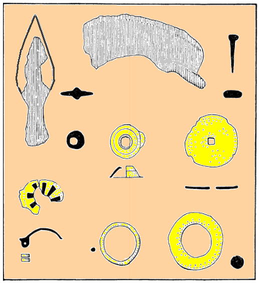 Römische Kleinfunde aus Eisen und Bronze aus Bowness on Solway, GB (Grabung von 1973).